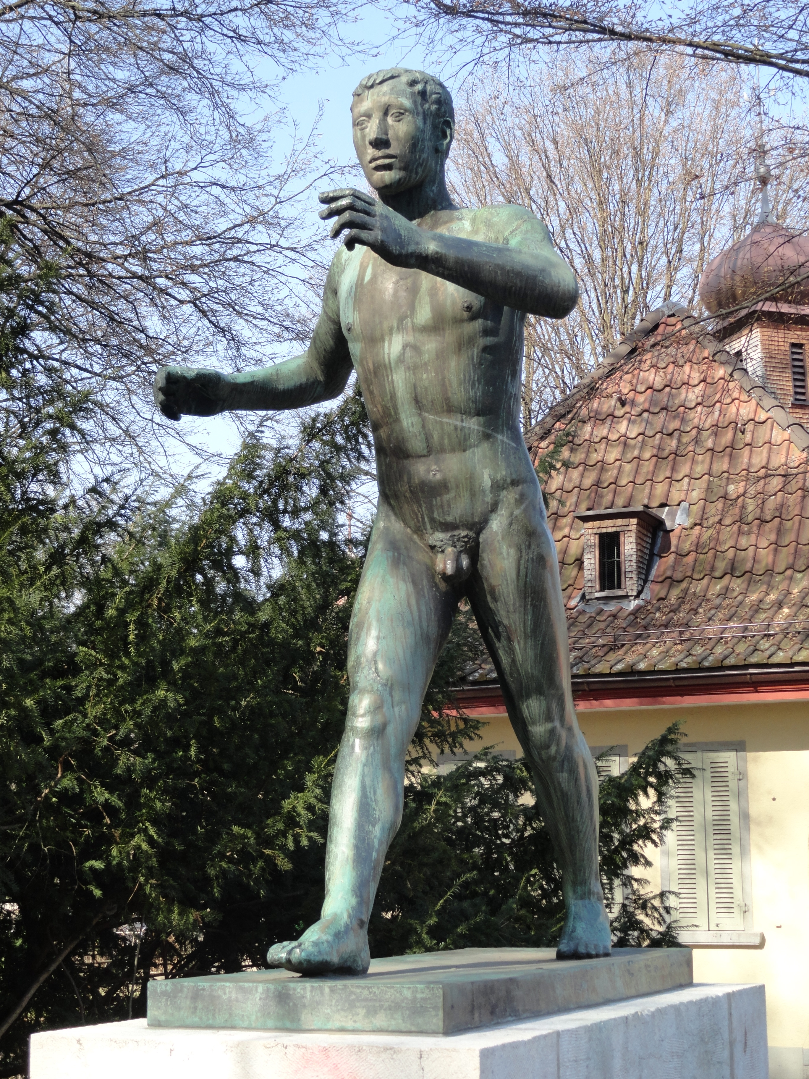 "Der Geher" von Franz Fischer in Zürich-Oerlikon, 1934